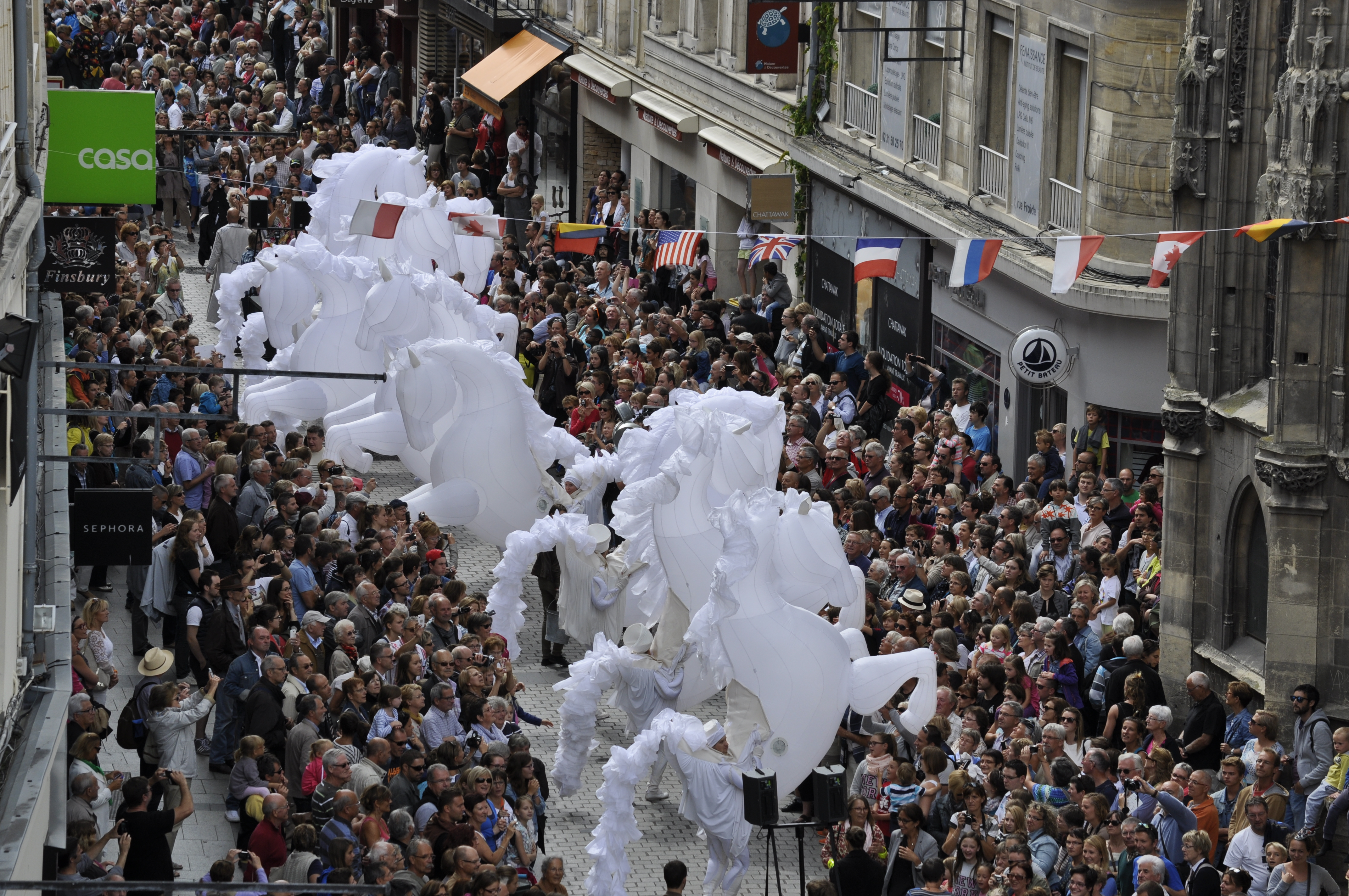 parade fantasque à Caen JEM2014